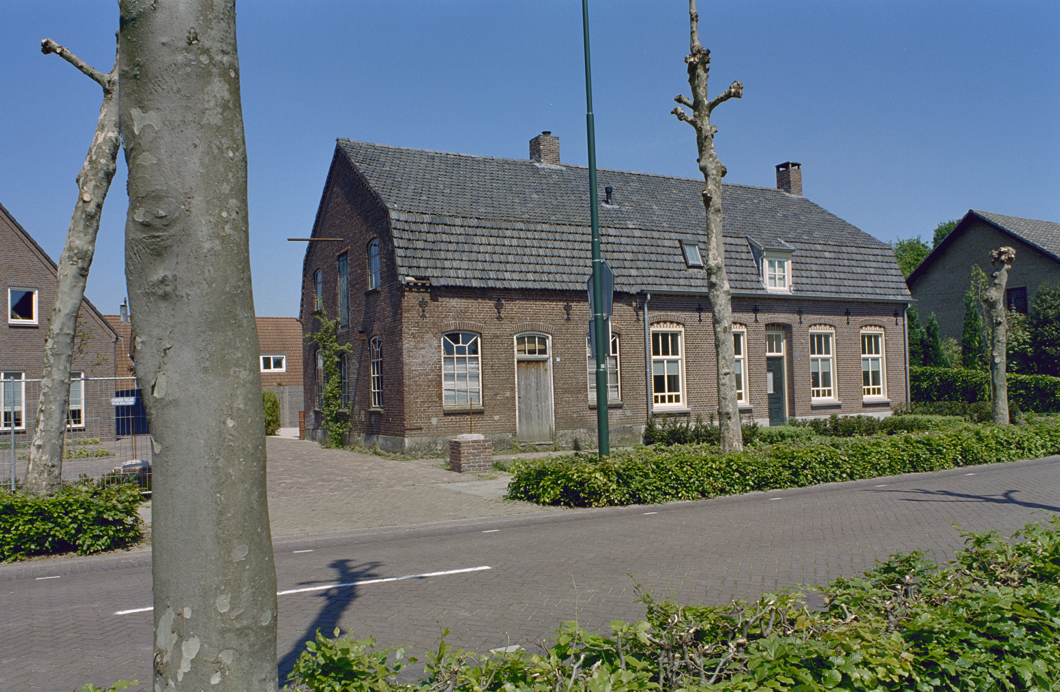 Overzicht (opmerking: Project opdracht: MSP bezwaarschriften. Geen projectnummer toegekend!)